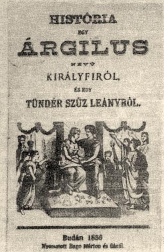 A mű 1886-os kiadása.